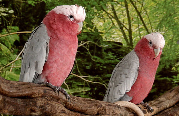 Rosakakadu Thomas Schultz